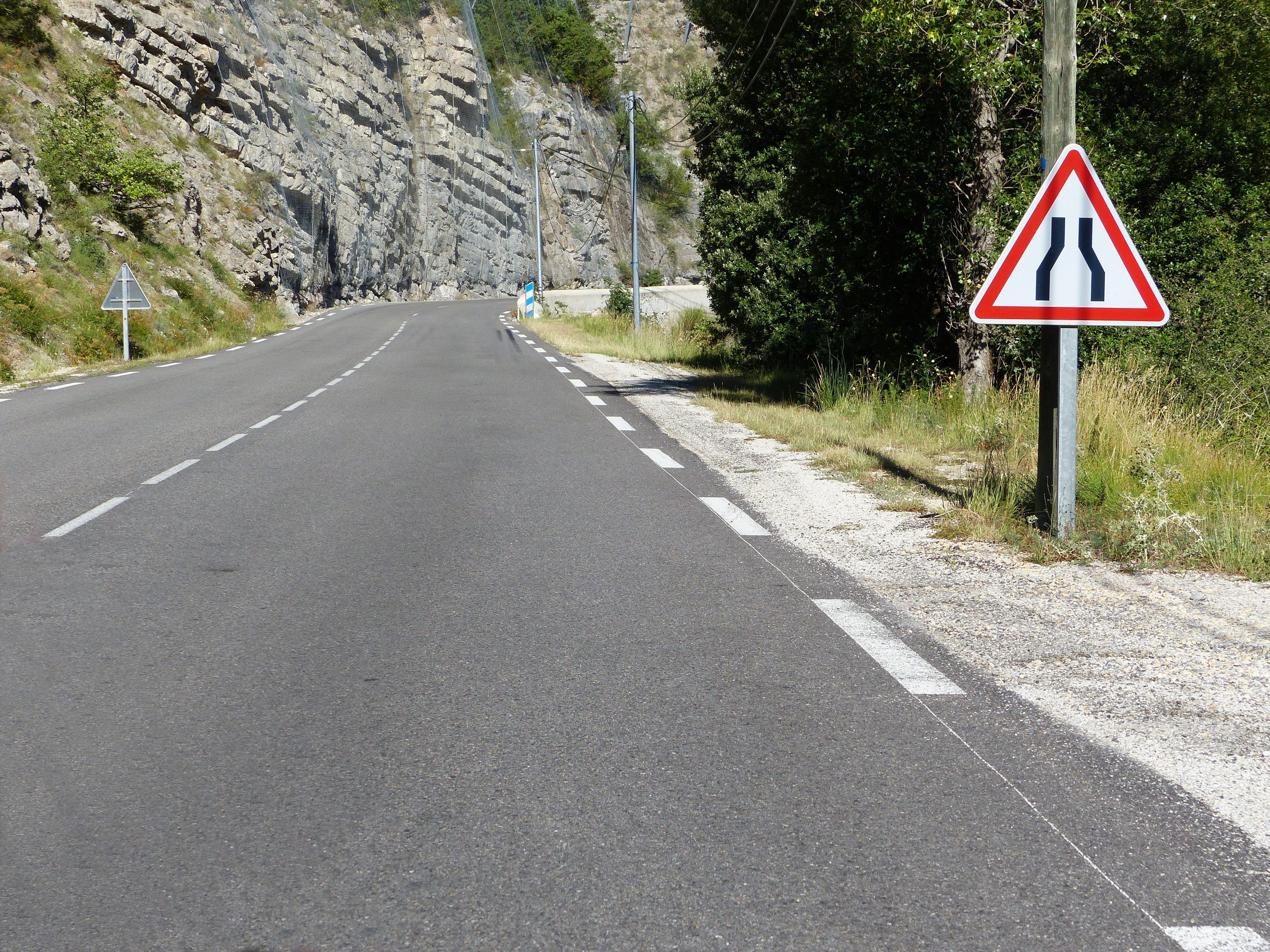 Panneau A3, départementale 94, Drôme, France.